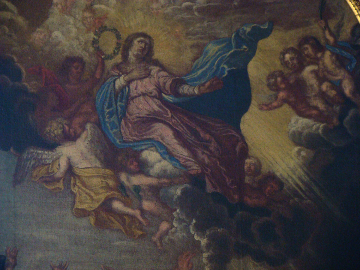 Kath. Kirche St. Alban in Heilbronn-Kirchhausen: altes Marienbild, Detail